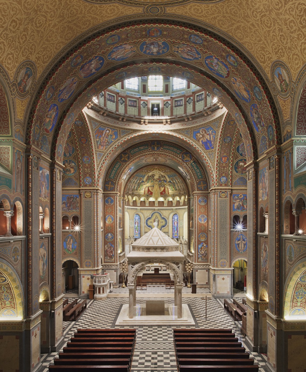 Fogadalmi templom liturgikus tere